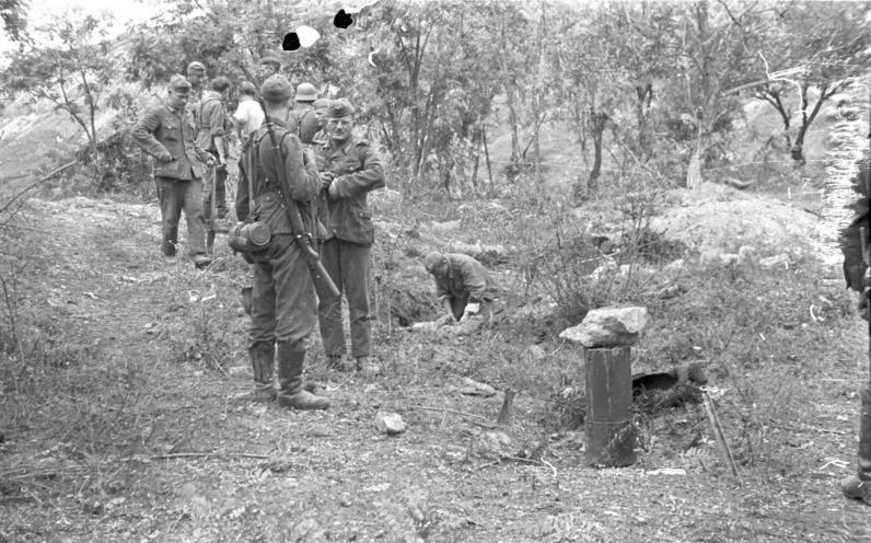 Auf dem Bunker über dem Dnjestr-Tal